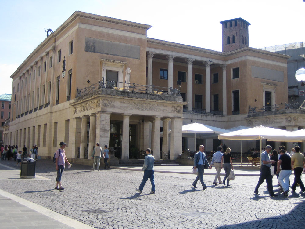 Caffè Pedrocchi, Padova